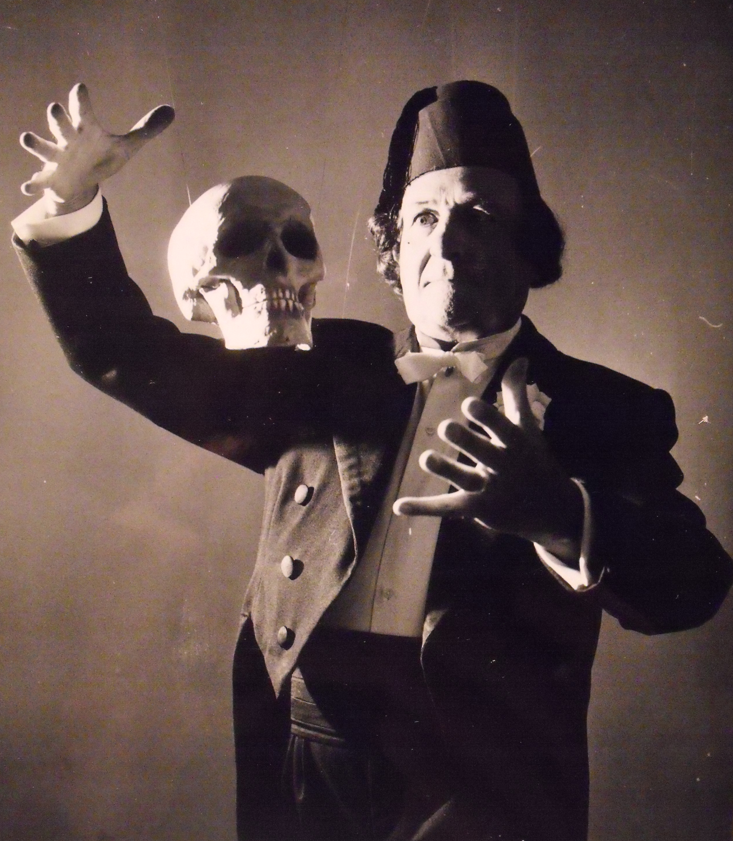 Utente:Wikiravenclaw,Christian Palvarini,fotografia inedita di mia proprietà.